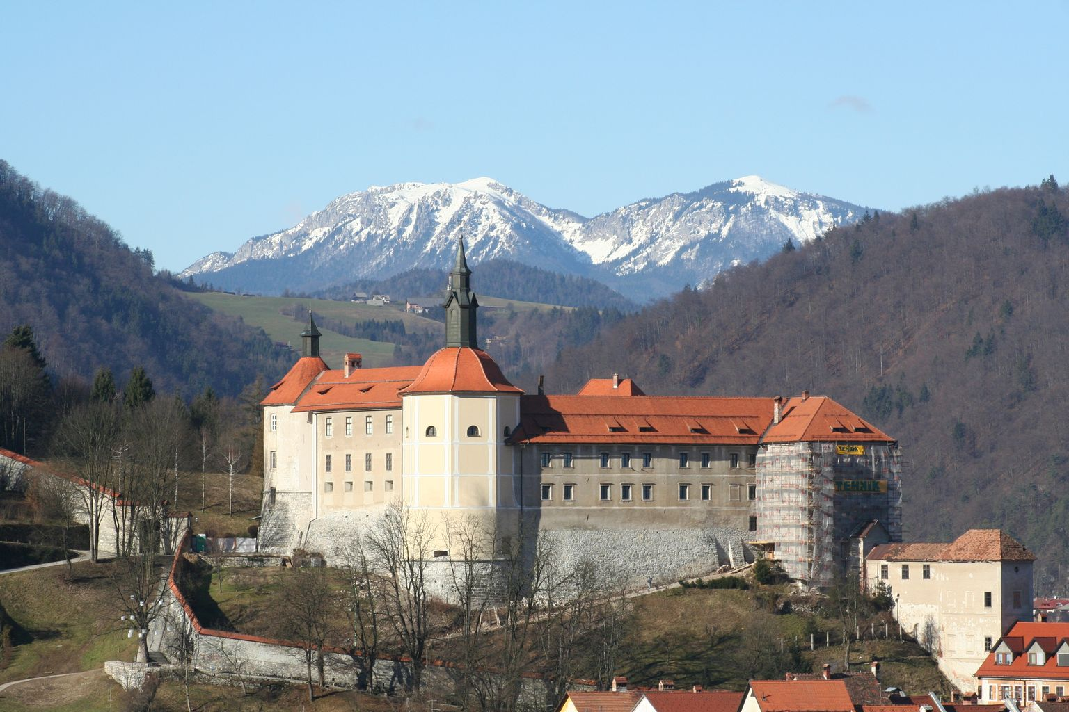 Škofja Loka castle, hill Ratitovec in background (Škofjeloški grad z Ratitovcem v ozadju)